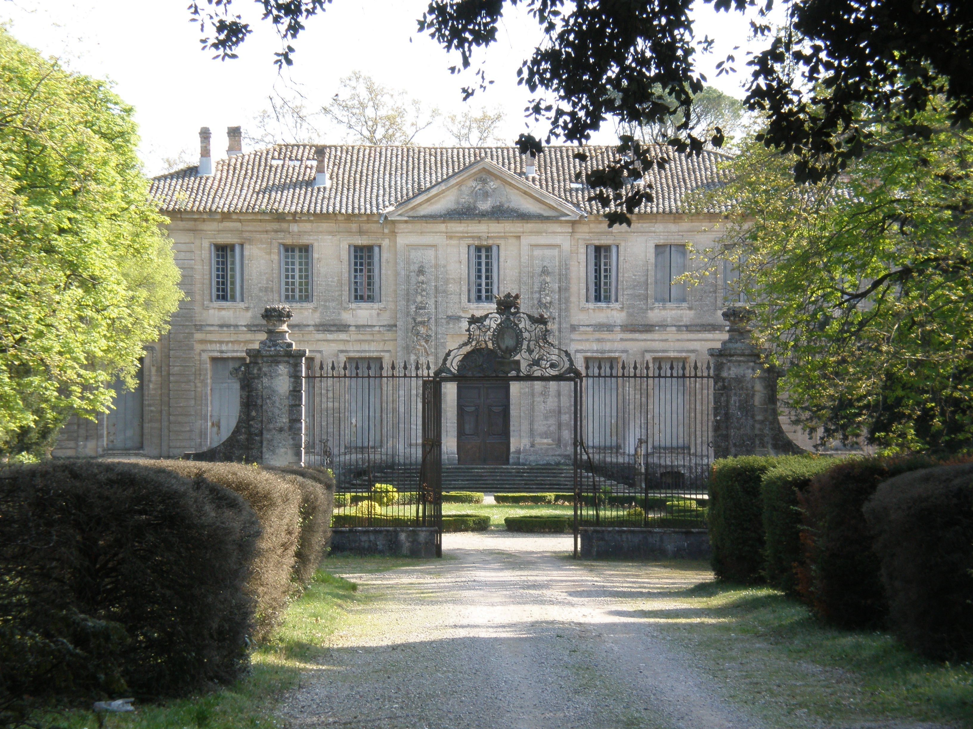 Le Château de la Piscine (Montpellier, Hérault 34)